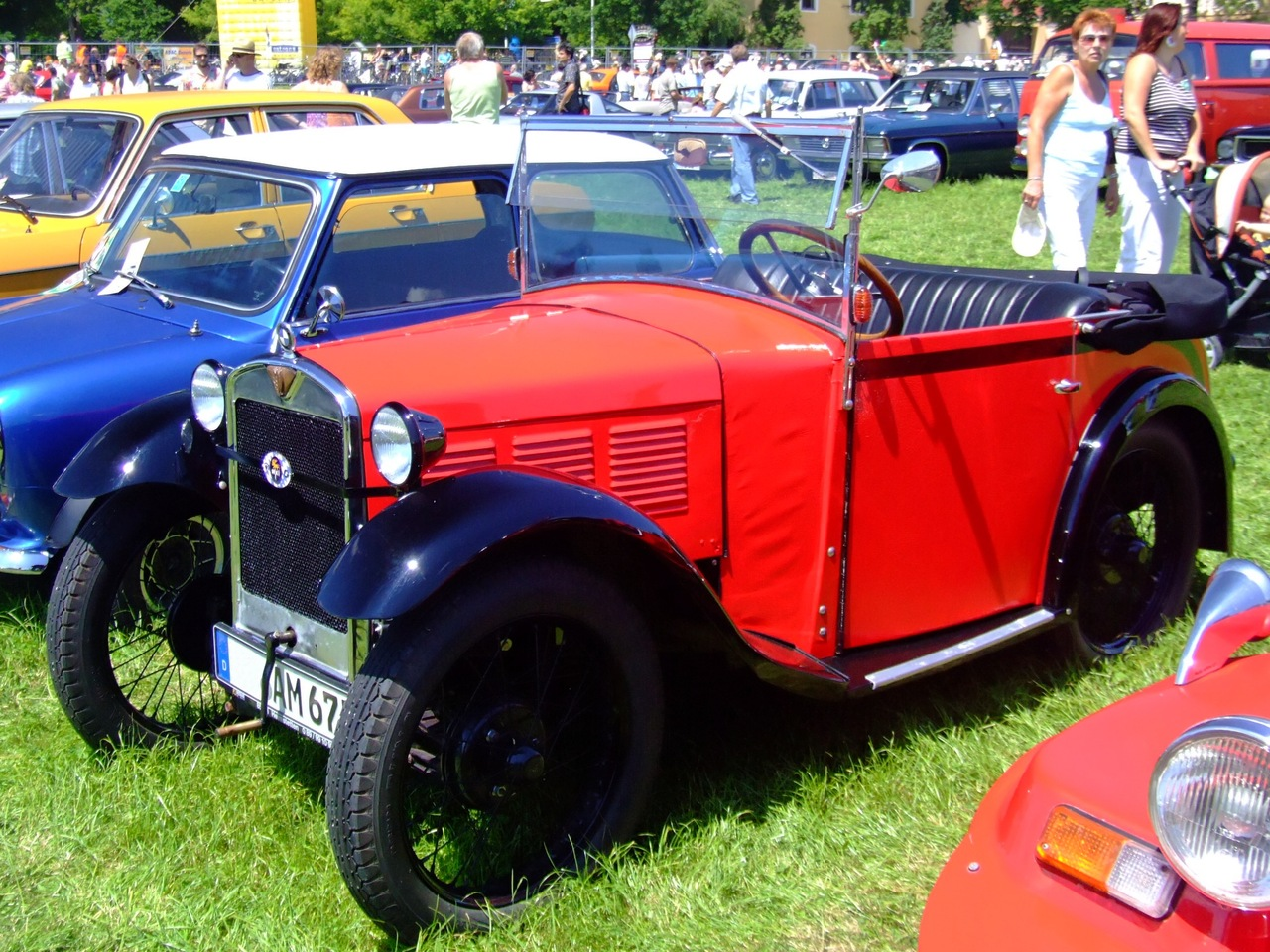 Quelle: selbst fotografiert, 06/2007 Fotograf: Späth Chr.